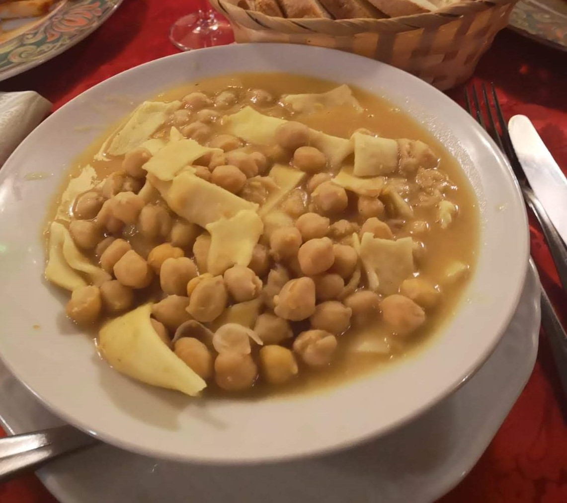 Pietanza di Lagane e ceci alla cosentina, primo piatto tipico di Cosenza